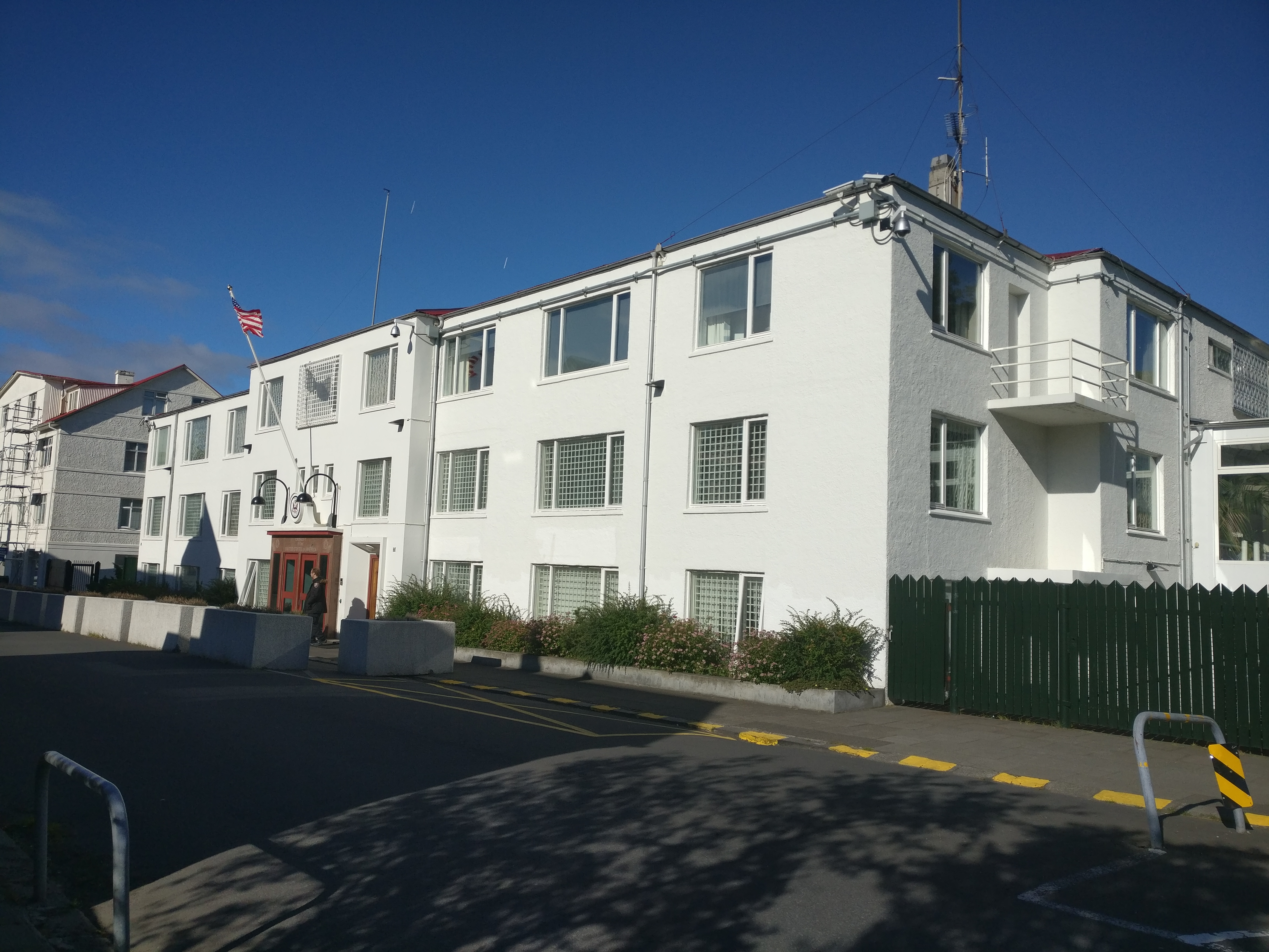 Laufásvegur 21, 101 Reykjavík, Iceland